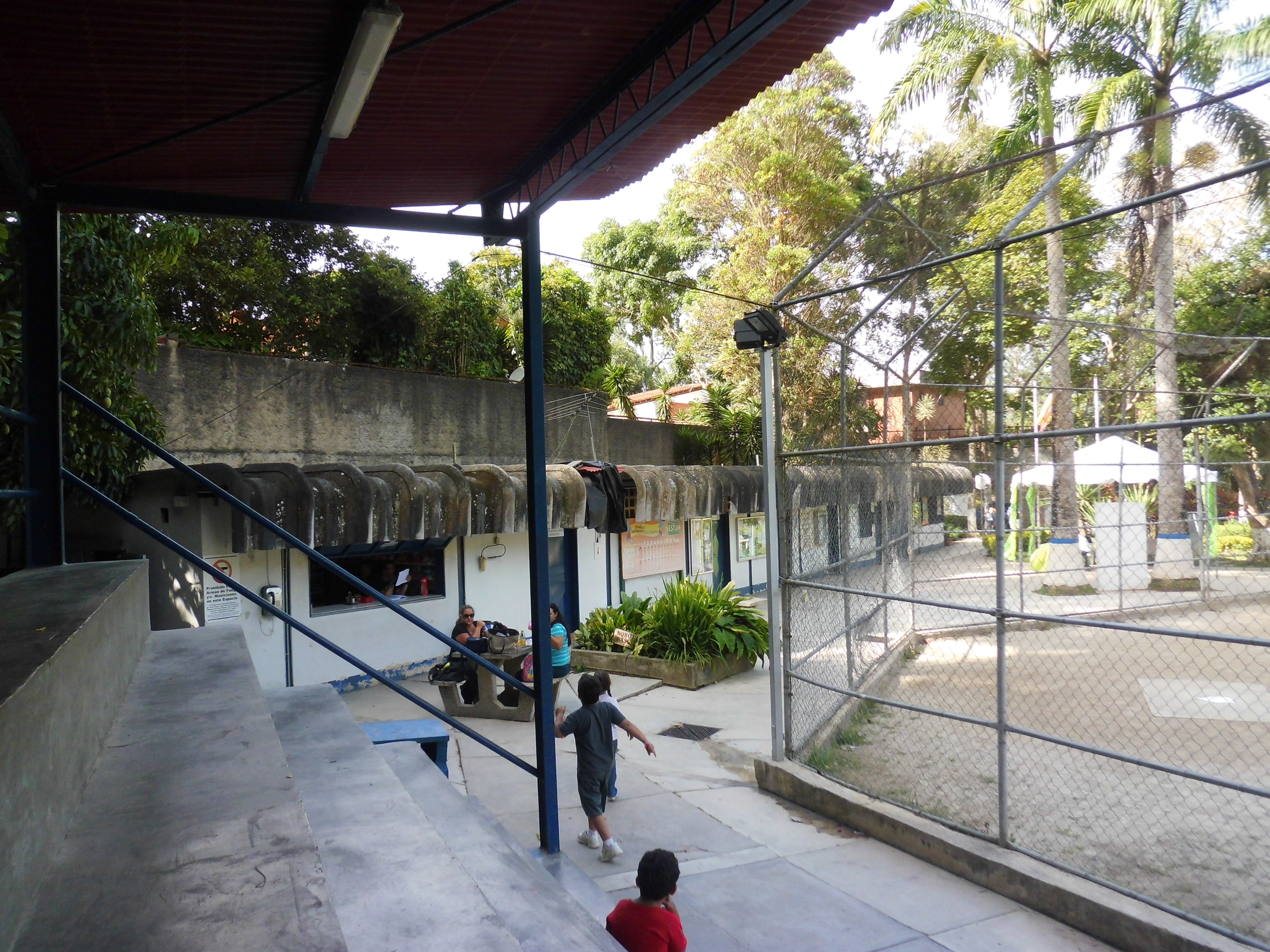 Polideportivo La Boyera, municipio el Hatillo, estado Miranda Venezuela.